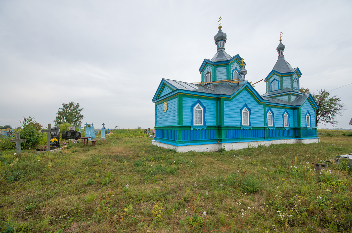 Михайлівська церква, с. Груд